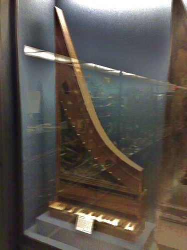 Clavicytherium anonyme - Ulm (?) ca 1480 - Royal College of Music